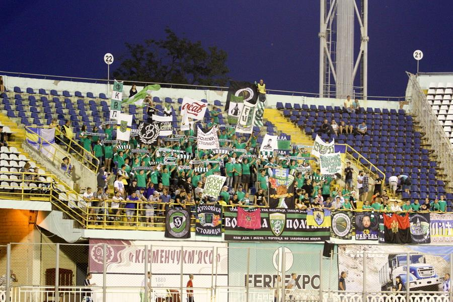 Вболівальники Ворскли